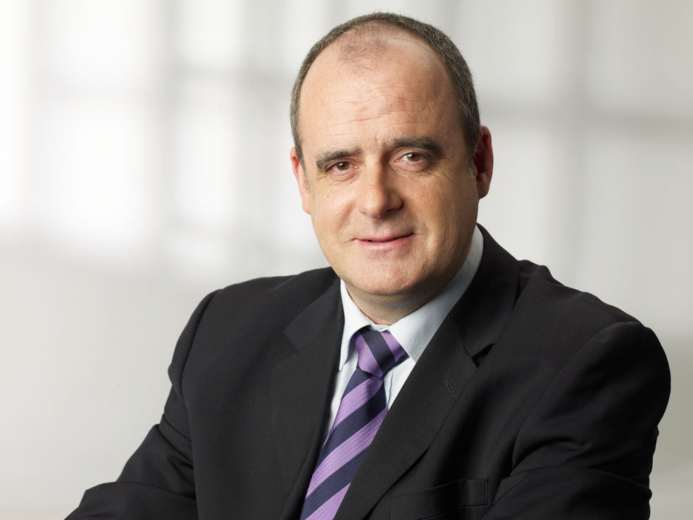 EAJ-PNVko GBBko presidentea.